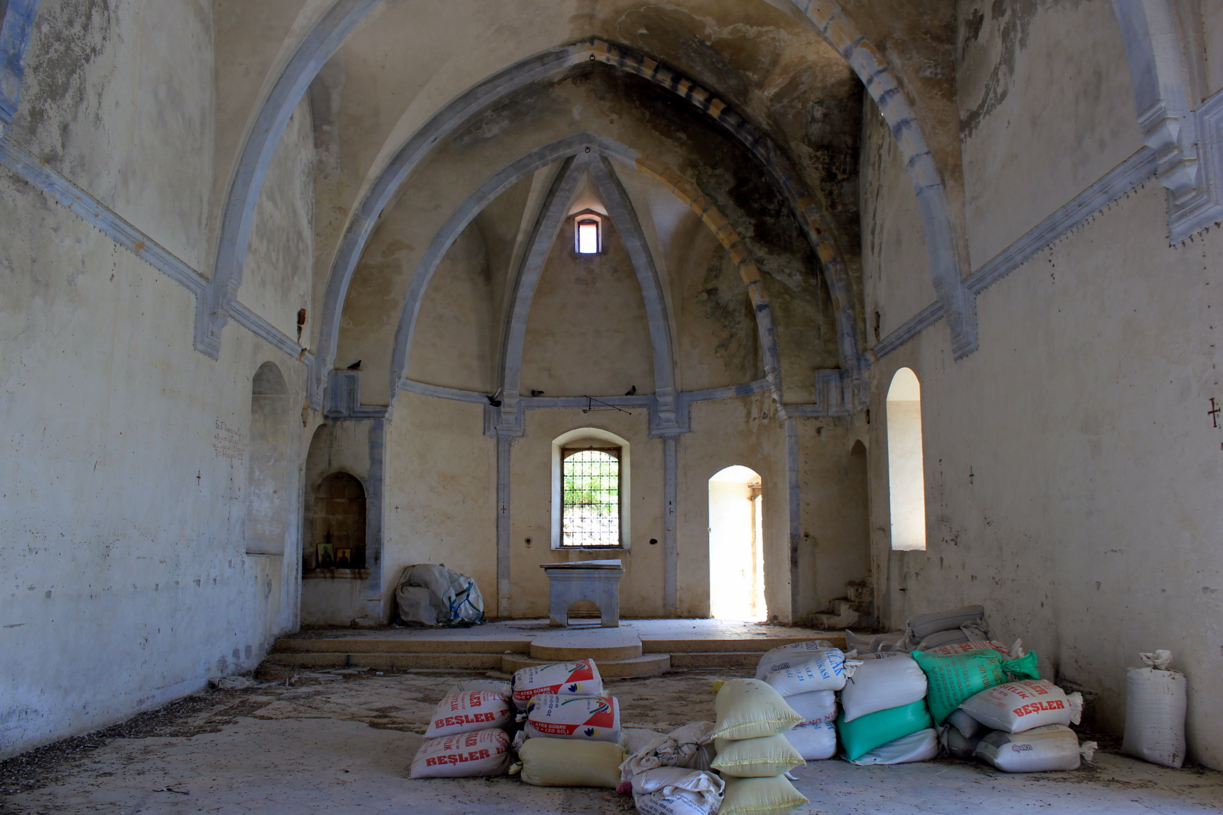 Kirche Agios Charampos in Agridaki/Alemdag, Nordzypern. Das Gebäude wurde 1820 errichtet und 1908-20 restauriert. In Folge der Besetzung Nordzyperns wurde die Innenausstattung entwendet.